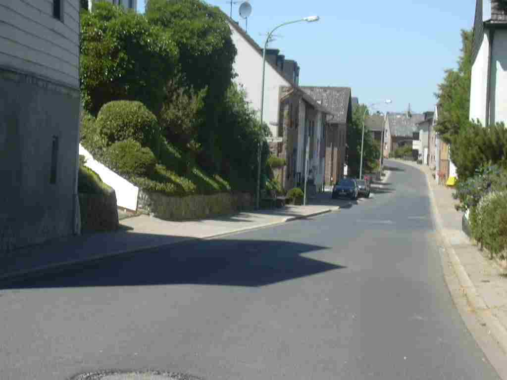 Hauptdurchgangsstraße Berzbuir bei Düren Own Work papa1234 Date: 2006-07-14